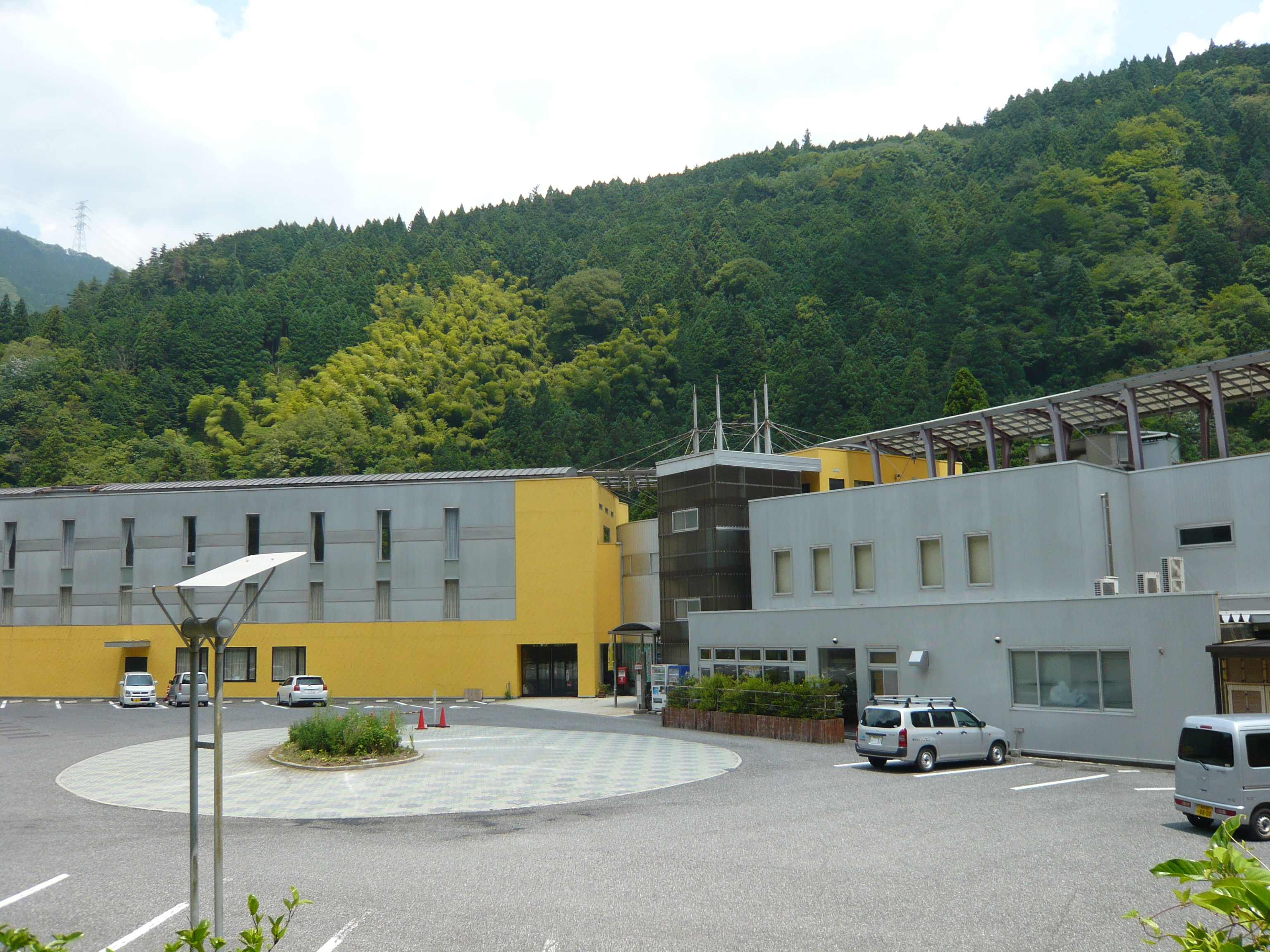 かすがモリモリ村